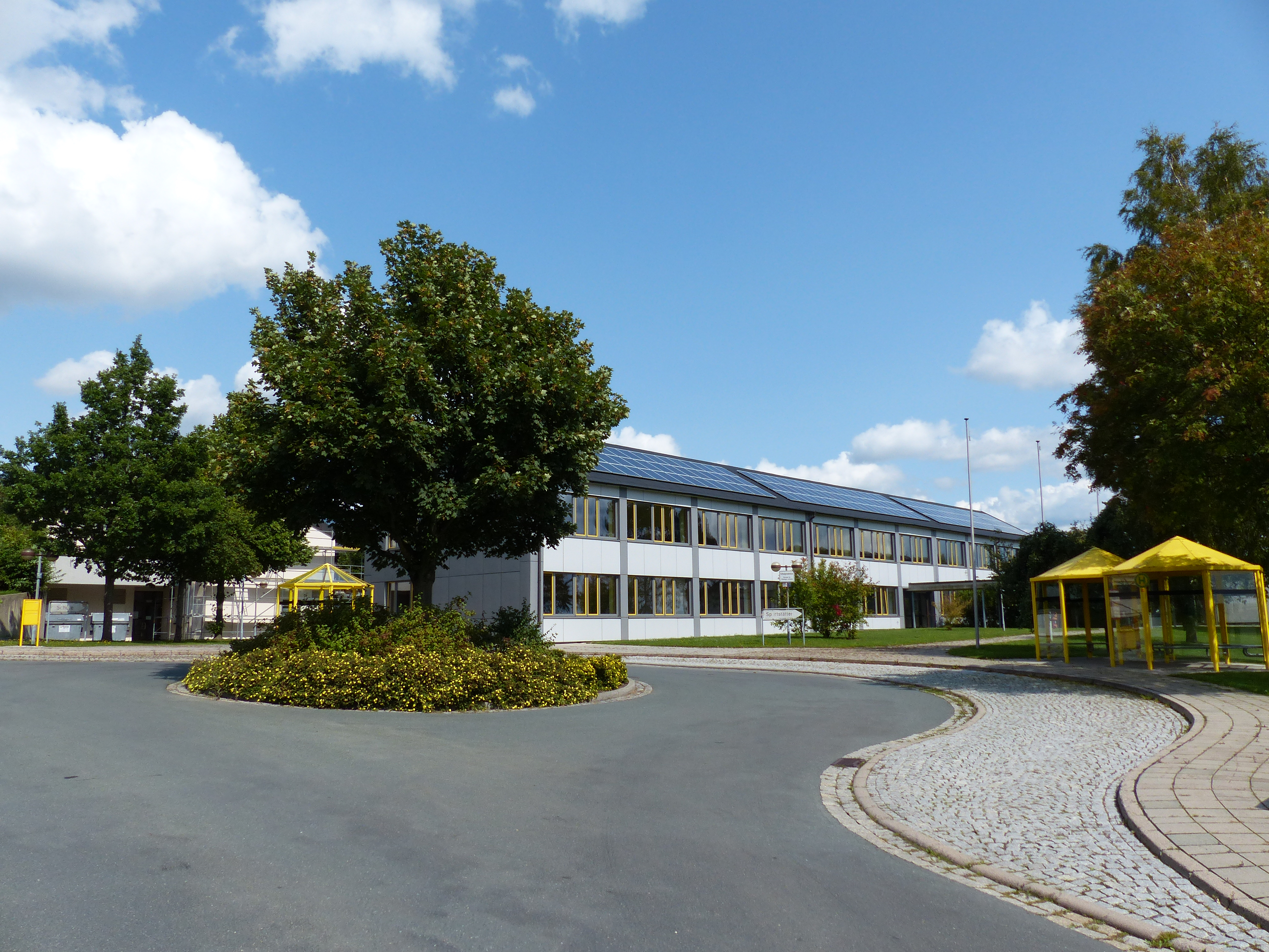 Schule in Ahornberg, Gemeinde Konradsreuth